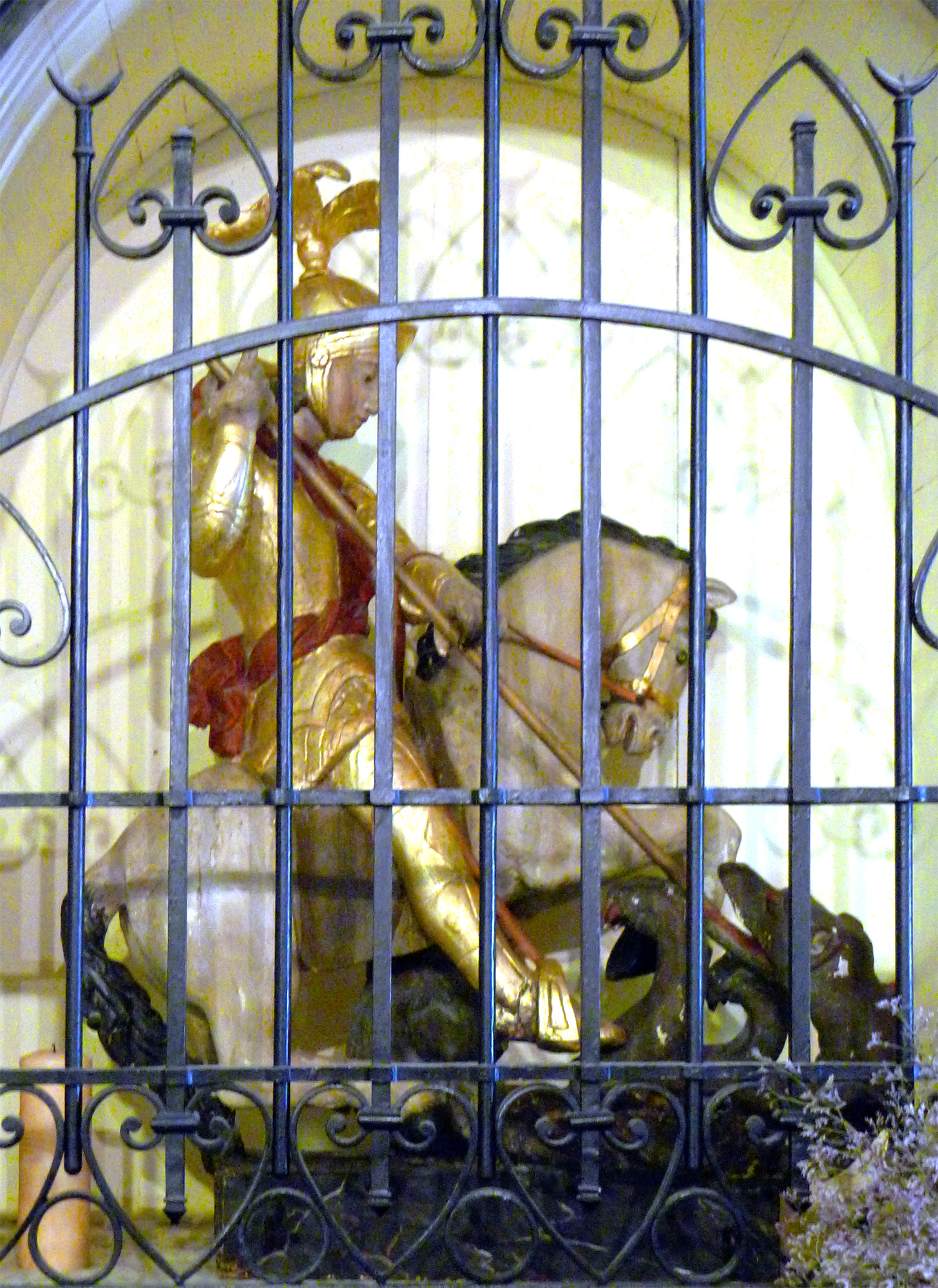 Statue de saint Georges terrassant le dragon, patron de la confrérie des Gardians, déposée dans l'église Notre-Dame-la-Major d'Arles.